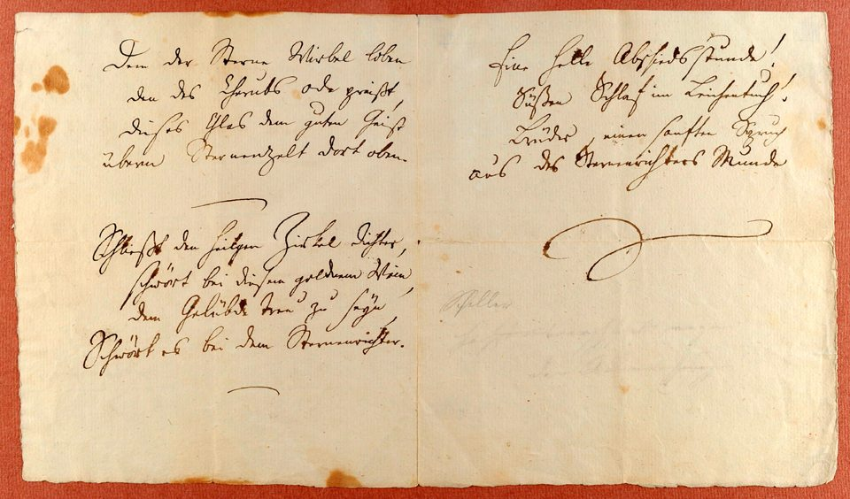 Autograph von Schillers Ode an die Freude, 2011 bei Moirandat in Basel versteigert Den der Sterne Wirbel loben, / Den des Seraphs Hymne preist, / Dieses Glas dem guten Geist / Überm Sternenzelt dort oben! / — / Schließt den heilgen Zirkel dichter, / Schwört bei diesem goldnen Wein: / Dem Gelübde treu zu sein, / Schwört es bei dem Sternenrichter! / — / Eine heitre Abschiedsstunde! / Süßen Schlaf im Leichentuch! / Brüder – einen sanften Spruch / Aus des Totenrichters Munde!